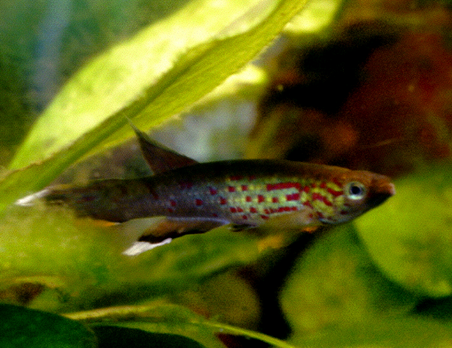 Aphyosemion australe (male)